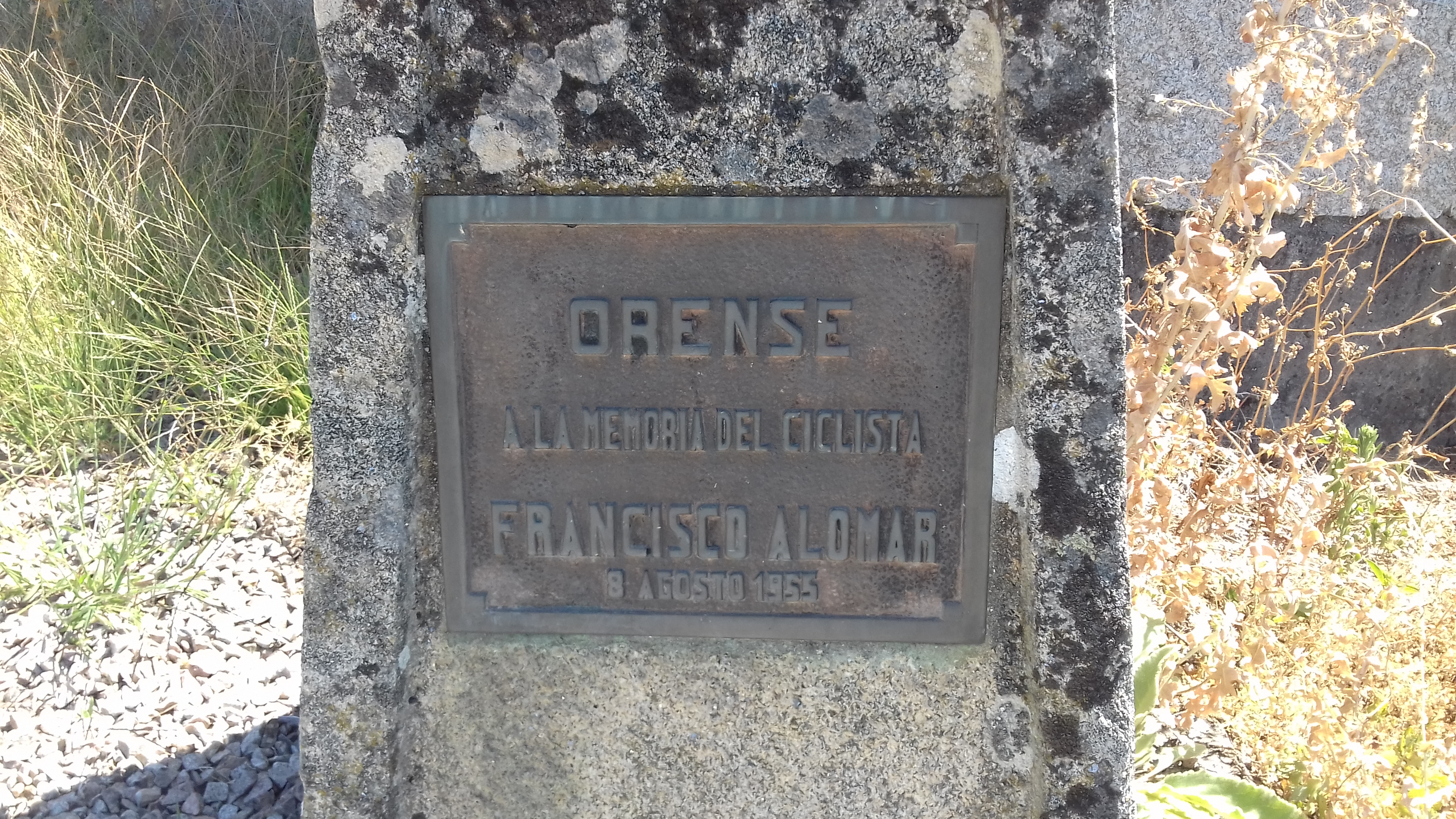 Placa en recordo a Francisco Alomar Florit no lugar do seu accidente mortal en Gustei (Coles)